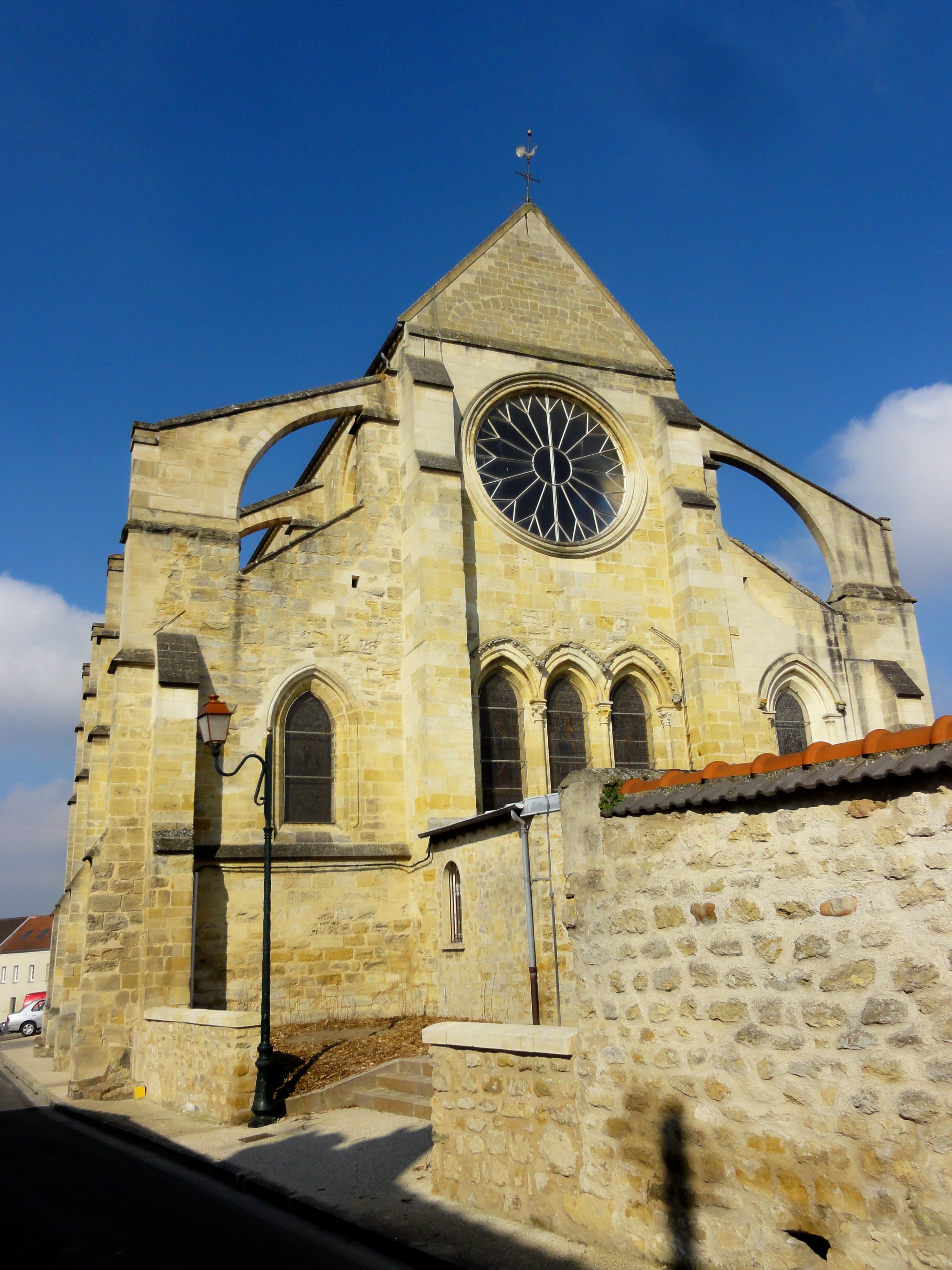 Vue sur le chevet.